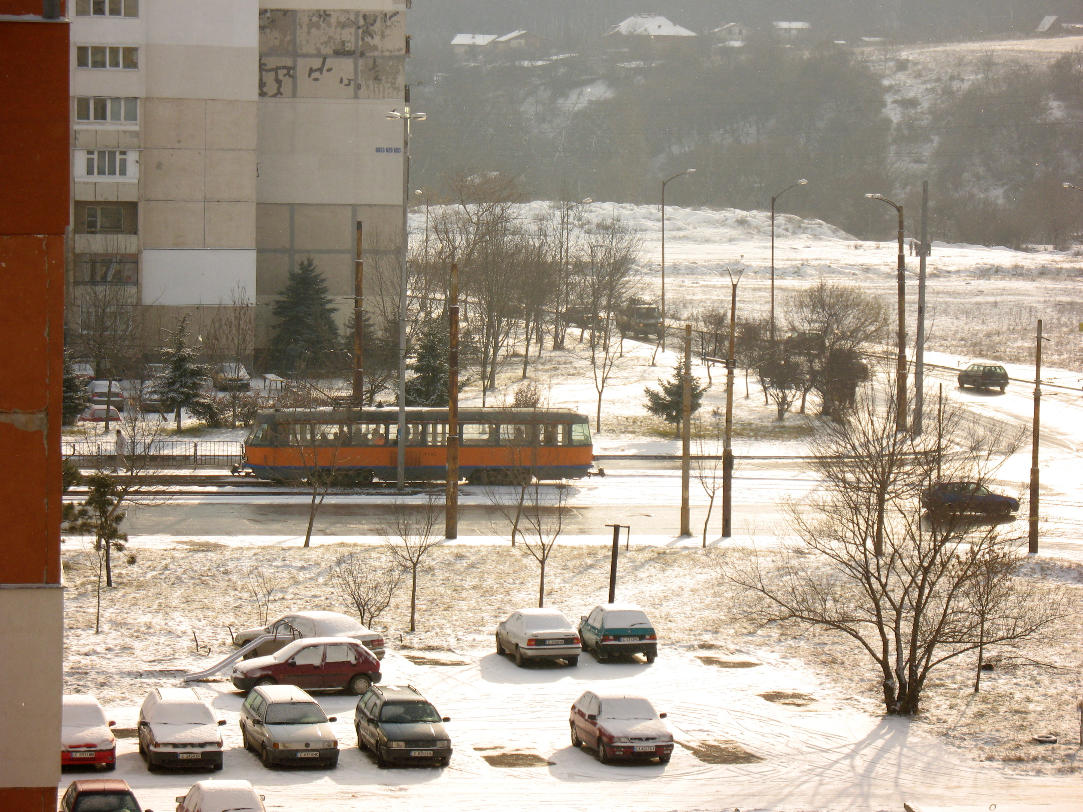 Трамвай 8 — Изглед от нашата къща в Люлин 5